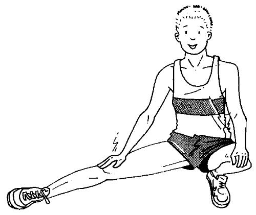 Souplesse exercice en station écarté.png